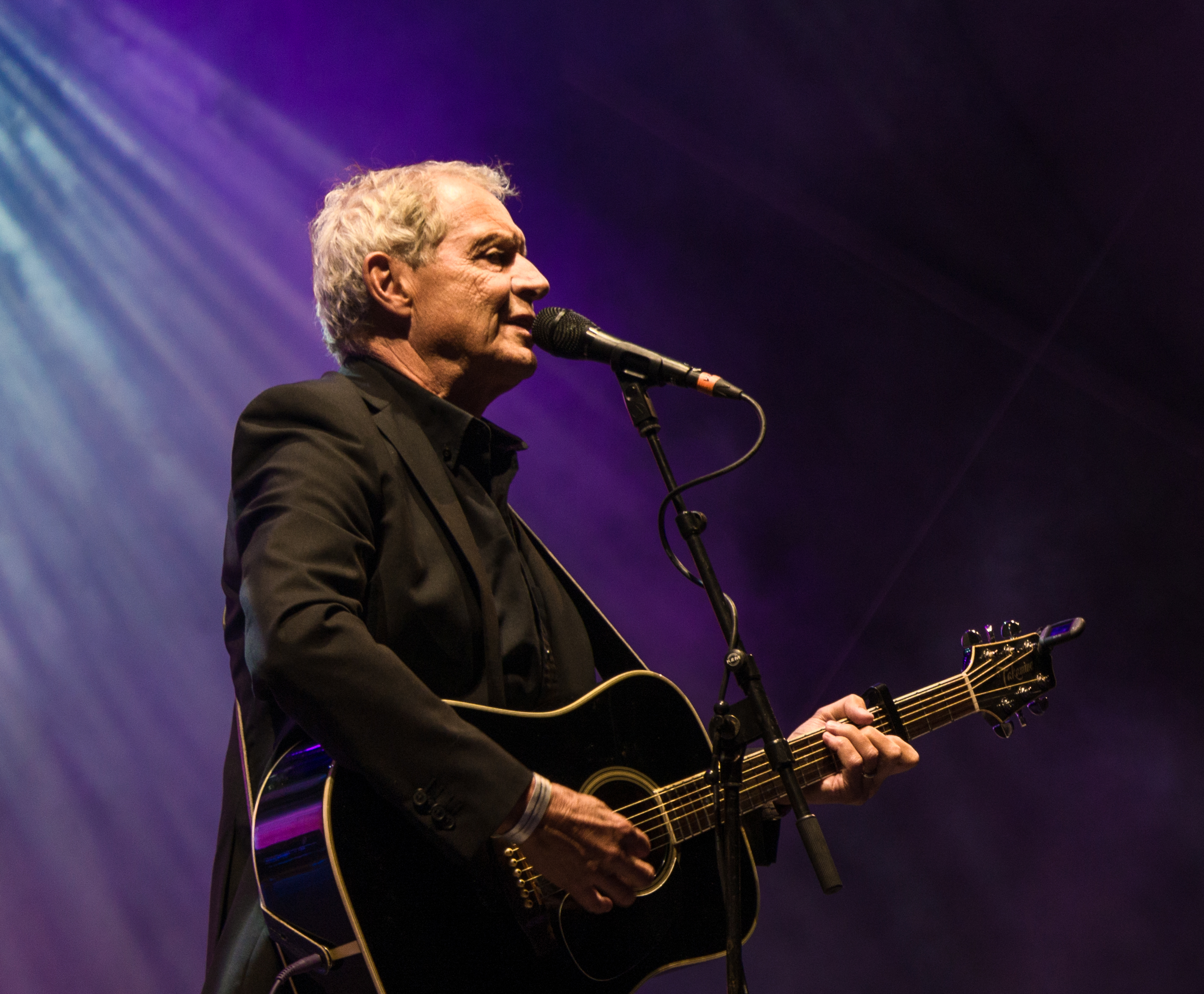 Tomas Adolphson i Adolphson & Falk uppträder på Gustav Adolfs torg på Stockholms Kulturfestival 2019.